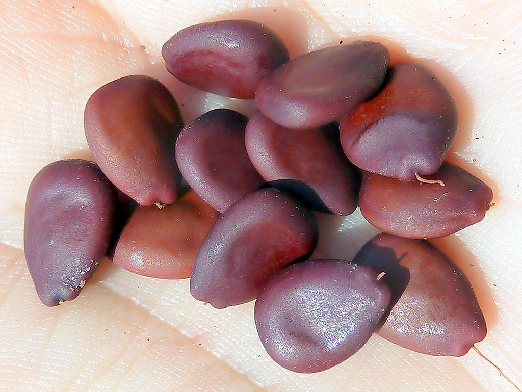 Ceratonia siliqua (Algarrobo) - Semillas sueltas, La Cañada Rufías, Albatera (Provincia de Alicante, España).